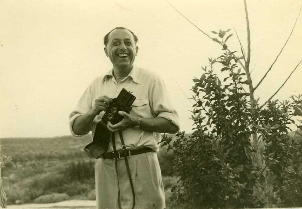 צילום של ד"ר גוטפריד בזיכרון יעקב. ד"ר גוטפריד גדל בווינה ולמד שם רפואה. הוא עלה לארץ ישראל במרץ 1934, ובשנת 1942 עבר לרעננה ושימש כרופא המחוזי של אזור השרון בקופ"ח כללית, עד צאתו לפנסיה בתחילת שנות השבעים. לאחר שיצא לפנסיה עבד במשרה חלקית כרופא בבית ספר ממלכתי ברעננה. הוא נפטר בשנת 1978 ומאותה שנה נקראת מרפאה בהרצליה על שמו.